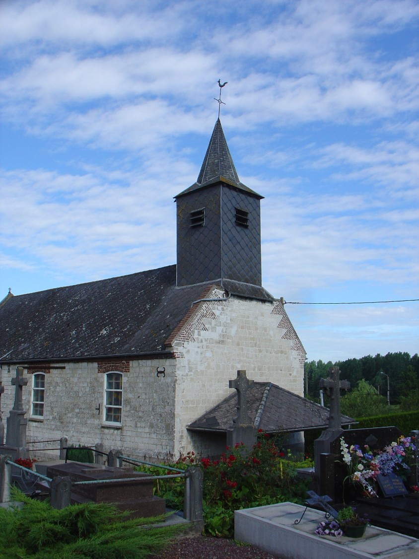 Église de Marest